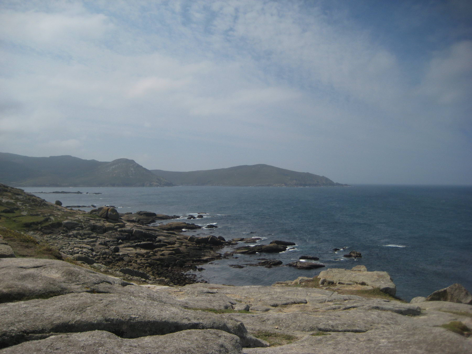 Vista desde o Muxía, Galicia.